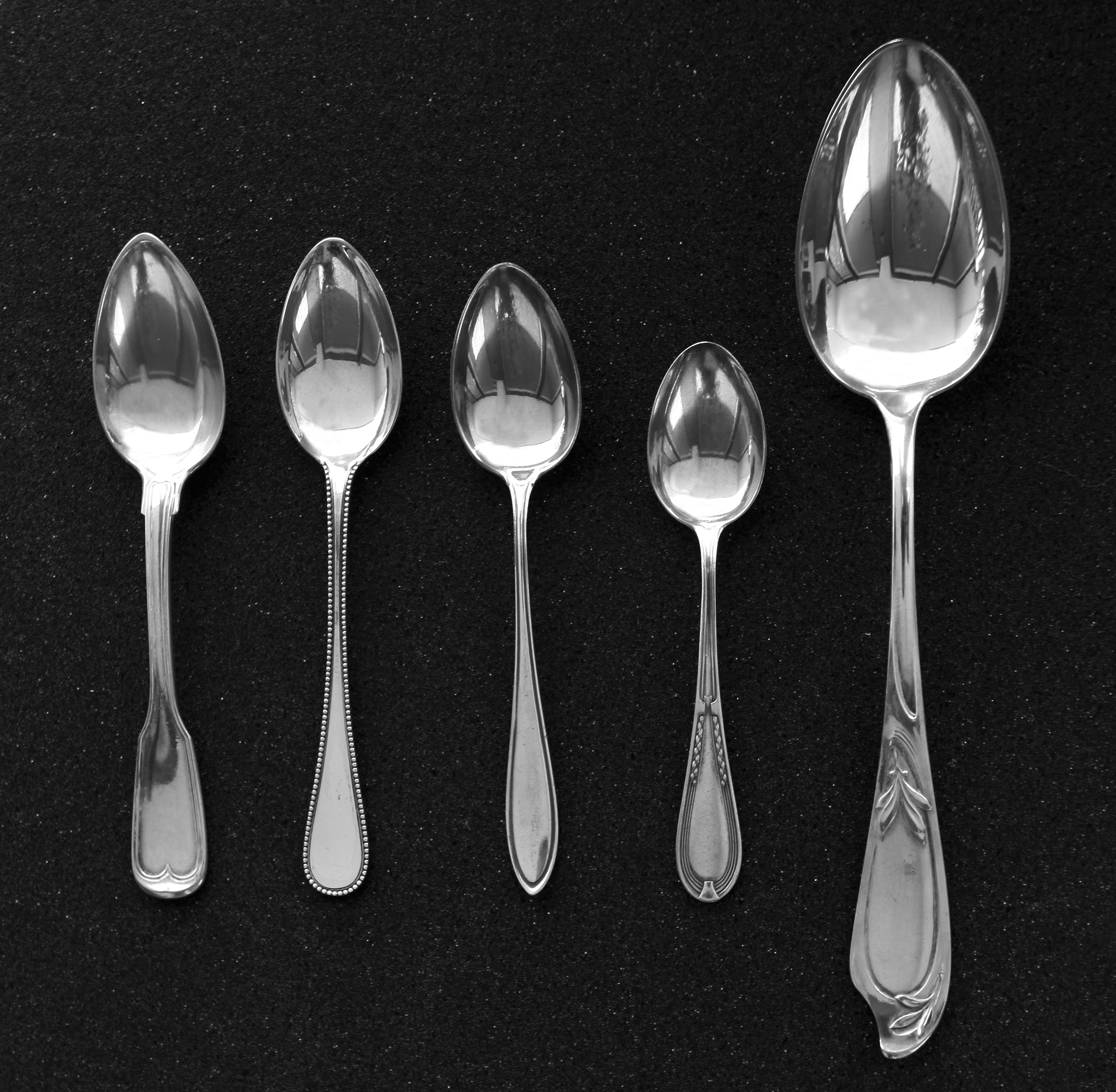 Form und Ornamentik älterer Silberlöffel aus der Zeit um 1900